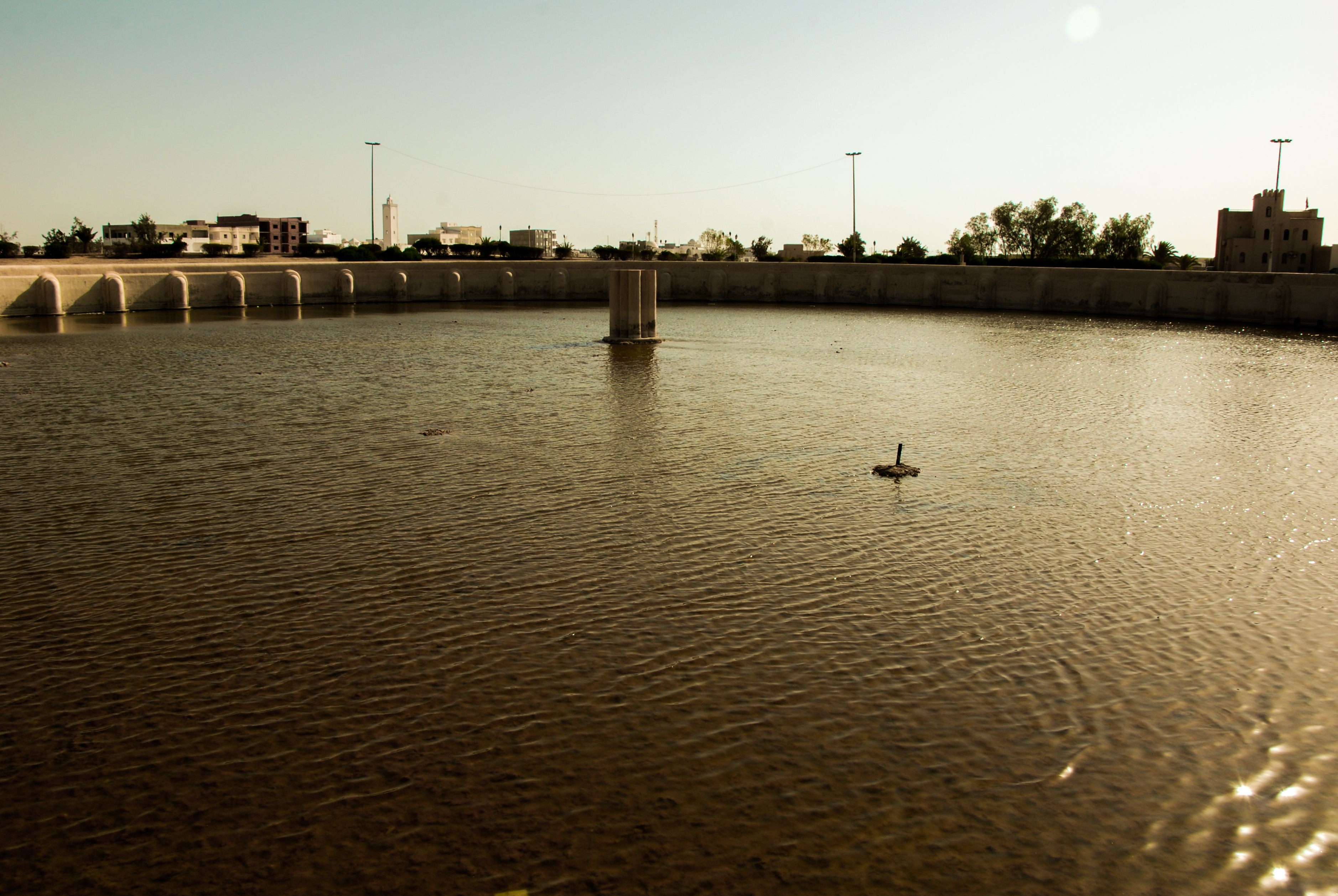 Bassins des Aghlabides, Raqqada